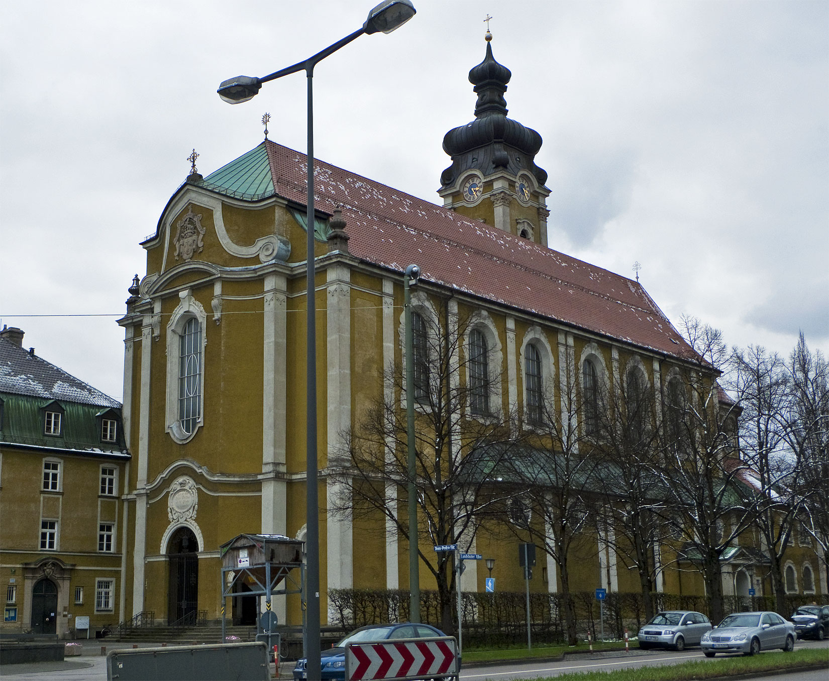 St.-Theresia-München